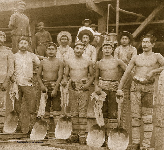 Imagen extraída del libro La masacre de la escuela Santa María de Iquique.Trabajadores pampinos.